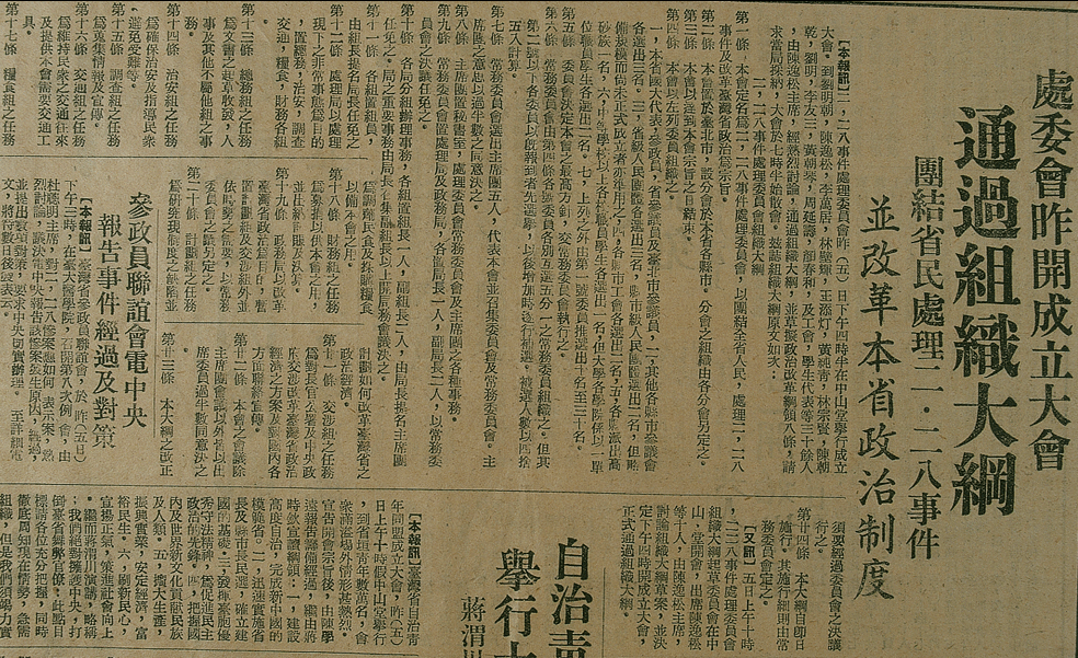 中文（台灣）: 二二八事件處理委員會召開成立大會，通過組織大綱，要求改革政治制度。